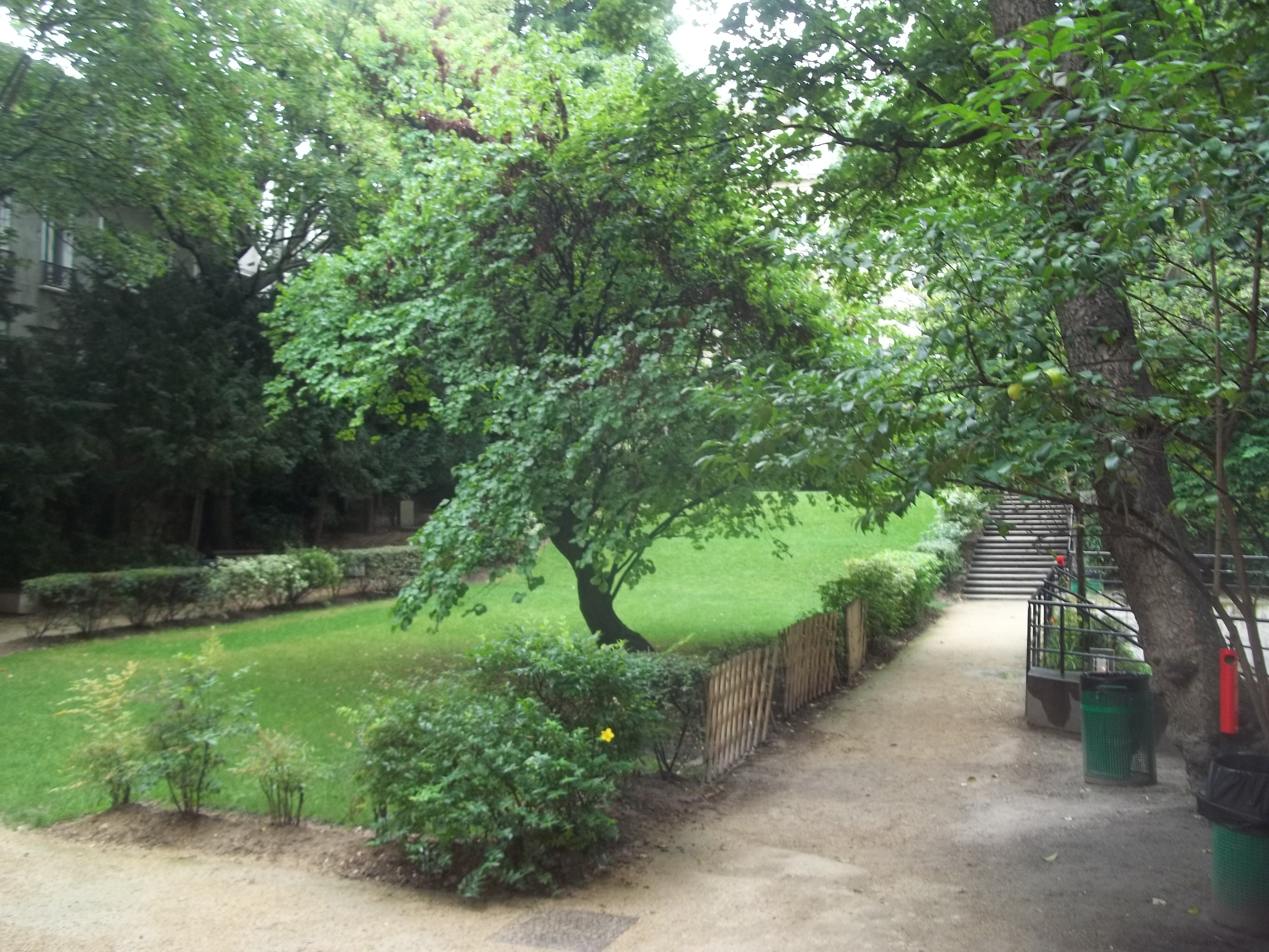 Jardin de Sciences Po Paris au 27 rue St-Guillaume. En arrière plan : le bâtiment du 56 rue des St-Pères